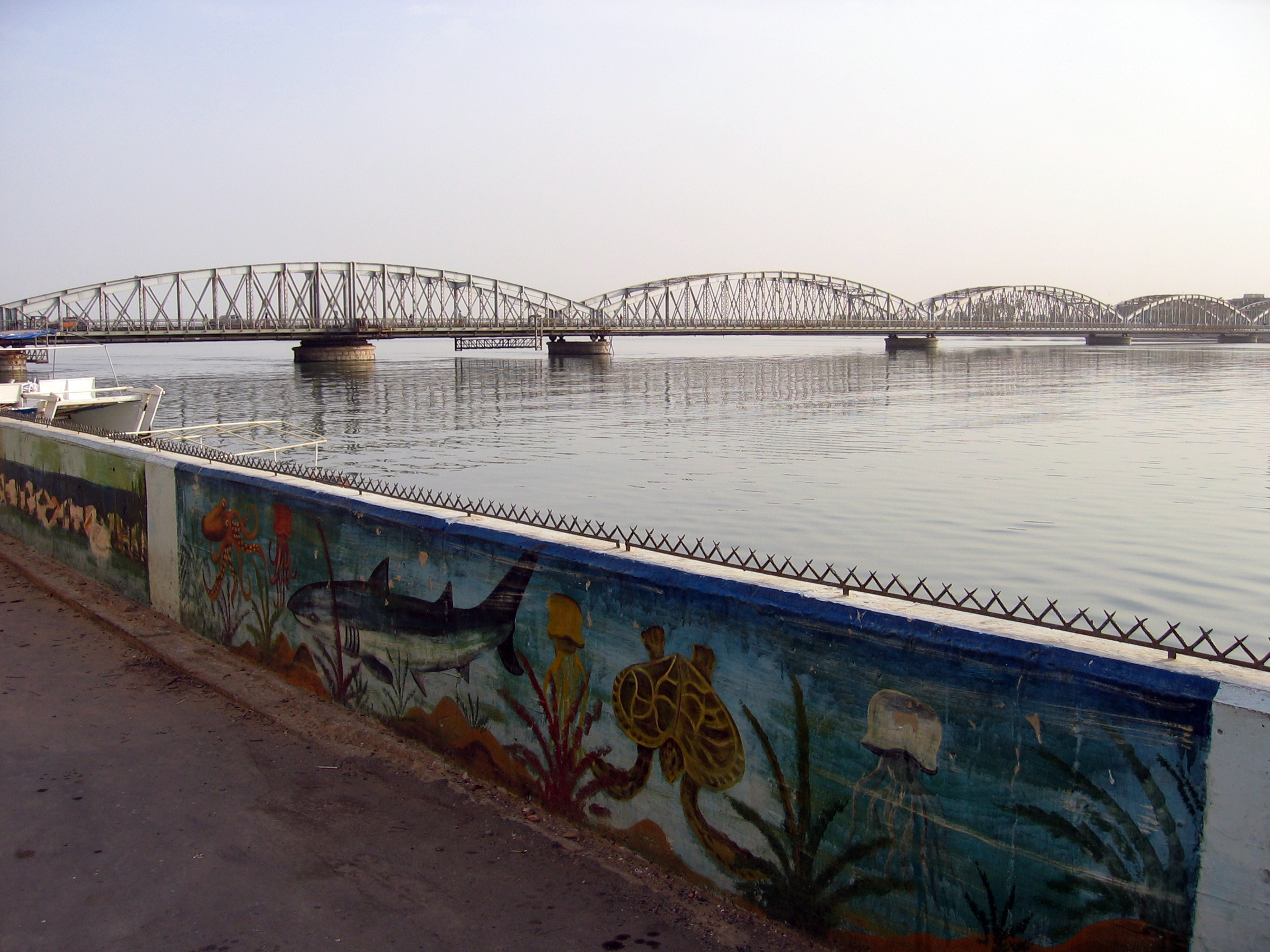 Le pont Faidherbe à Saint-Louis du Sénégal